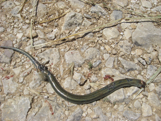 Chalcides chalcides prey of Falco sp. - Monte Carcaci - Sicily